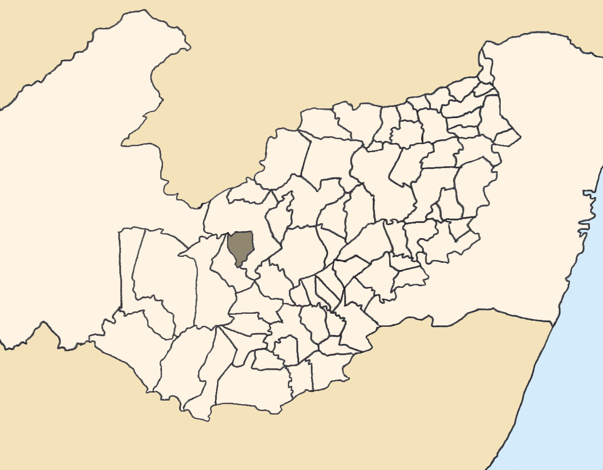 Mapa da mesorregião Agreste de Pernambuco (Brasil) subdivida em municípios. Em destaque, o município de Alagoinha. Map of the brazilian state of Pernambuco (mesorregião Agreste) showing the city of Alagoinha. Imagem tratada com o GIMP. Image made with GIMP.